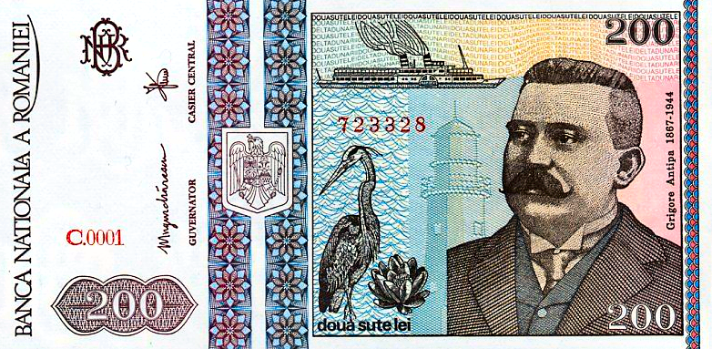 Grigore Antipa, Banknote 1992